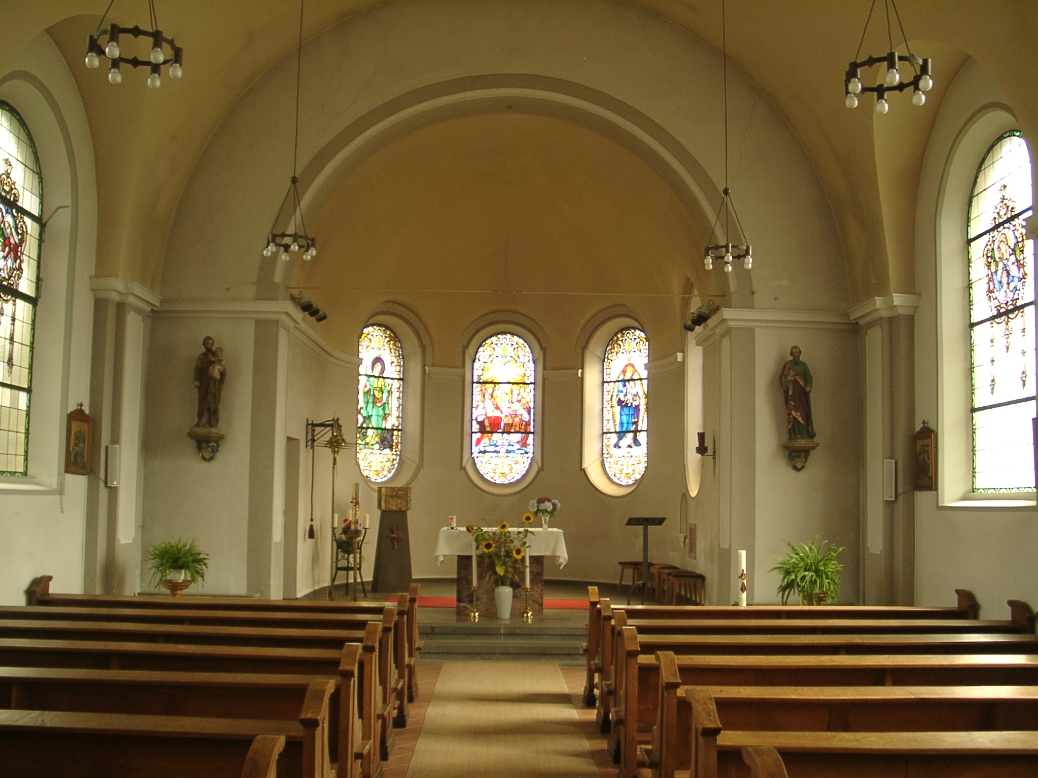 Kirche in Wolken (MYK), Innenansicht.